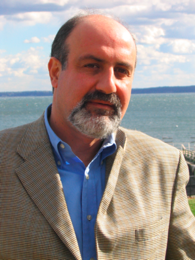 Nassem Talib